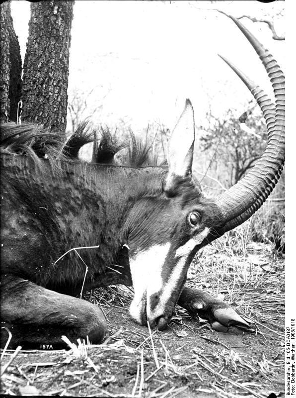 Antilope